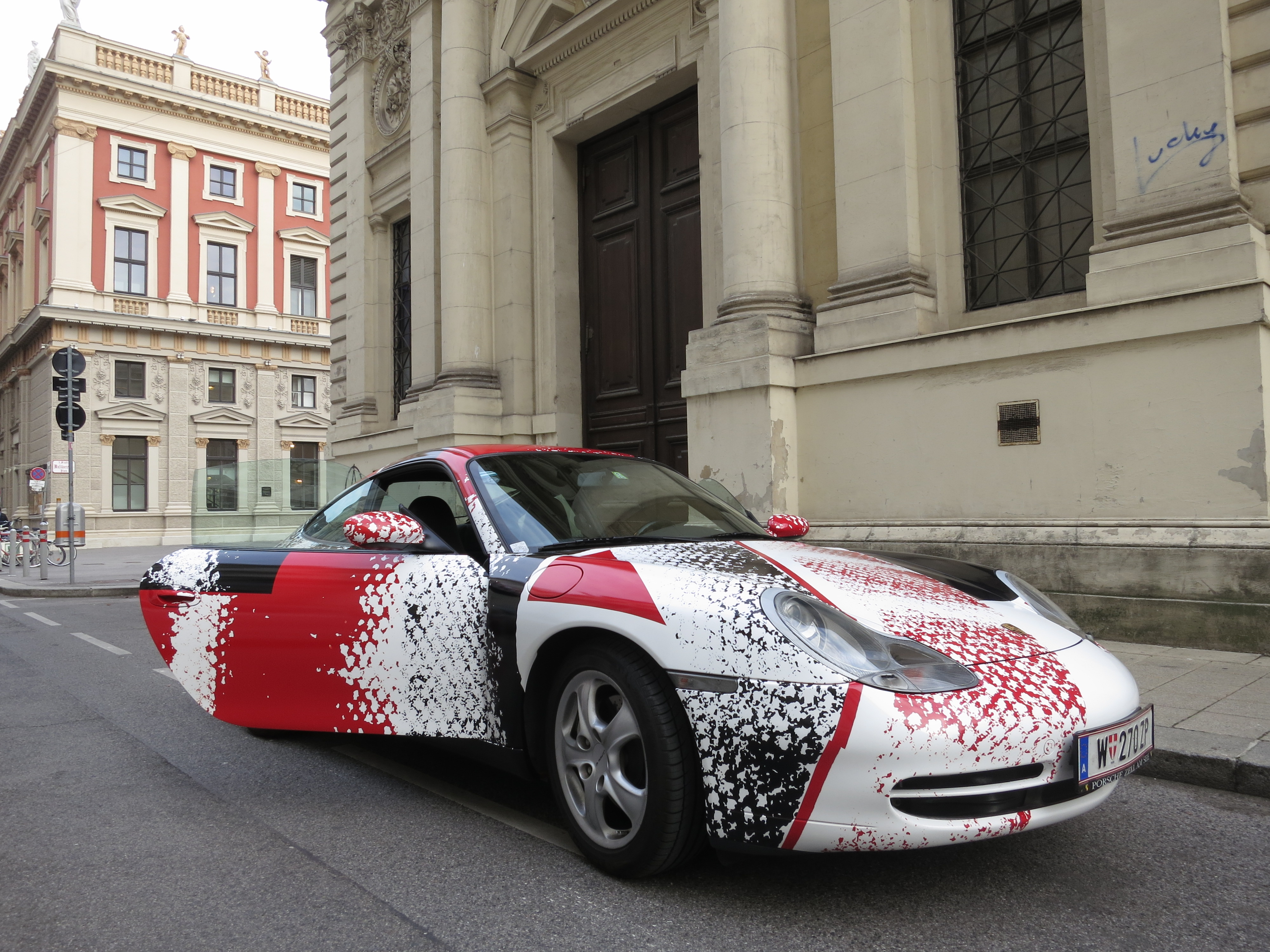 Joachim Lothar Gartner - Design für Porsche, 2014